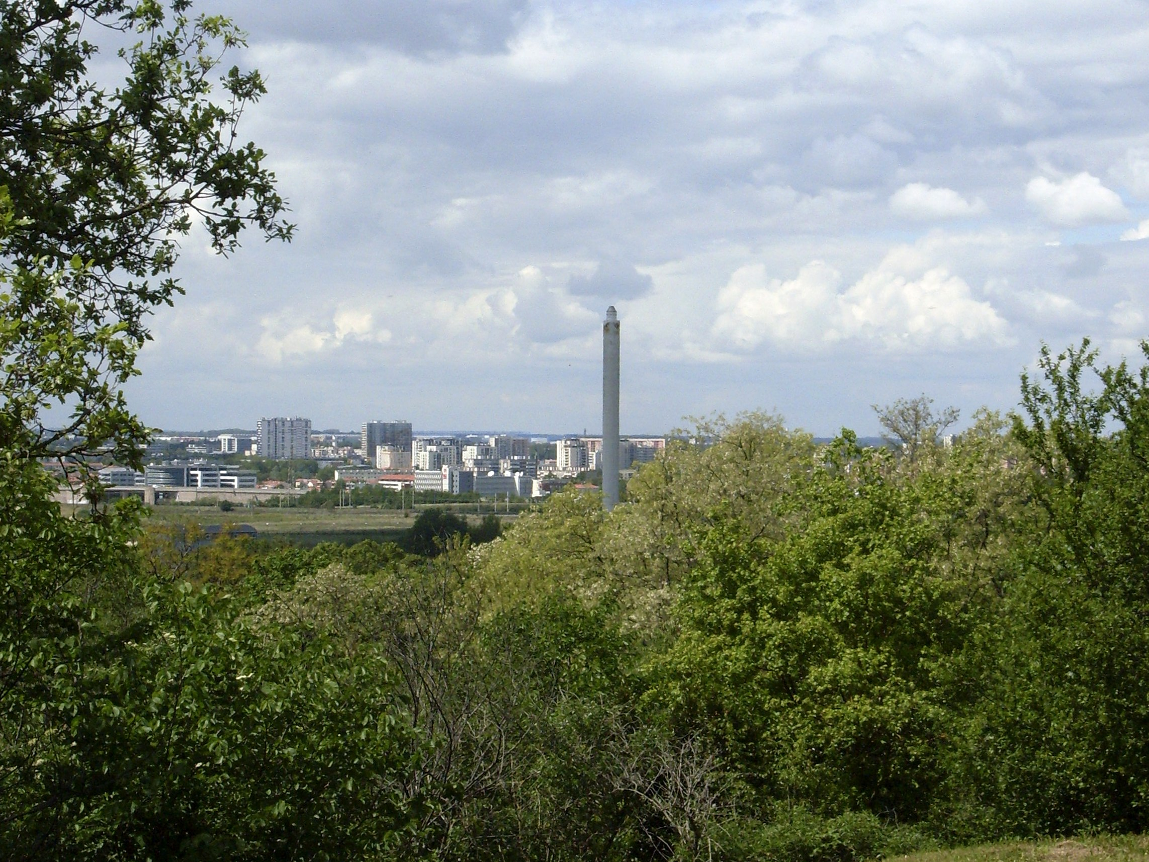 Toulouse (Haute-Garonne, France) : Cheminée de l'usine de la SNPE sur l'île du Ramier et immeubles de La Fourguette vus depuis Pech David.